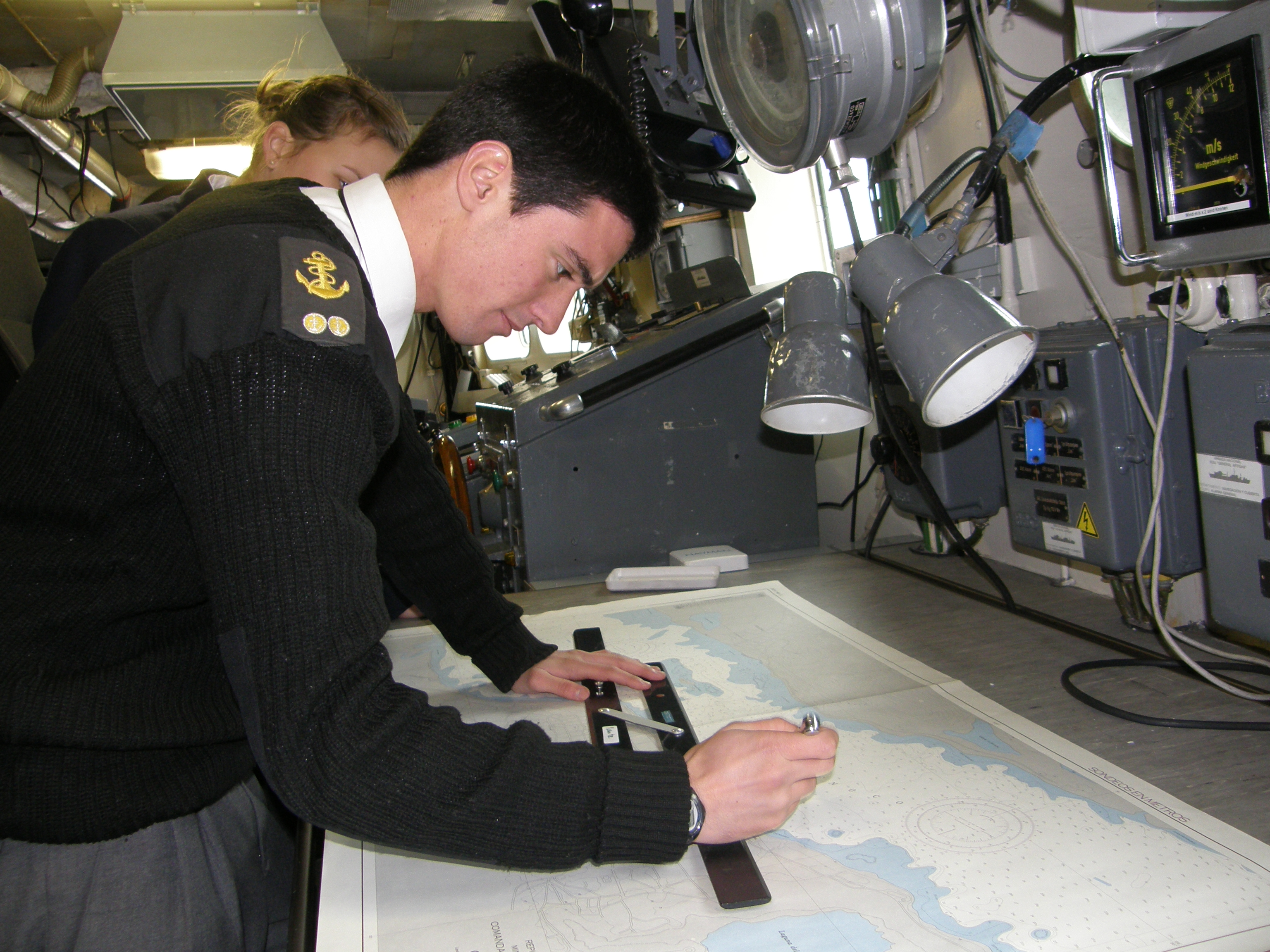 En pleno trazado de mapa en puente